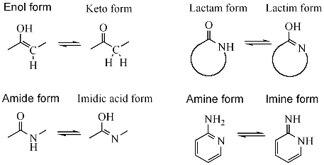 tautomer examples